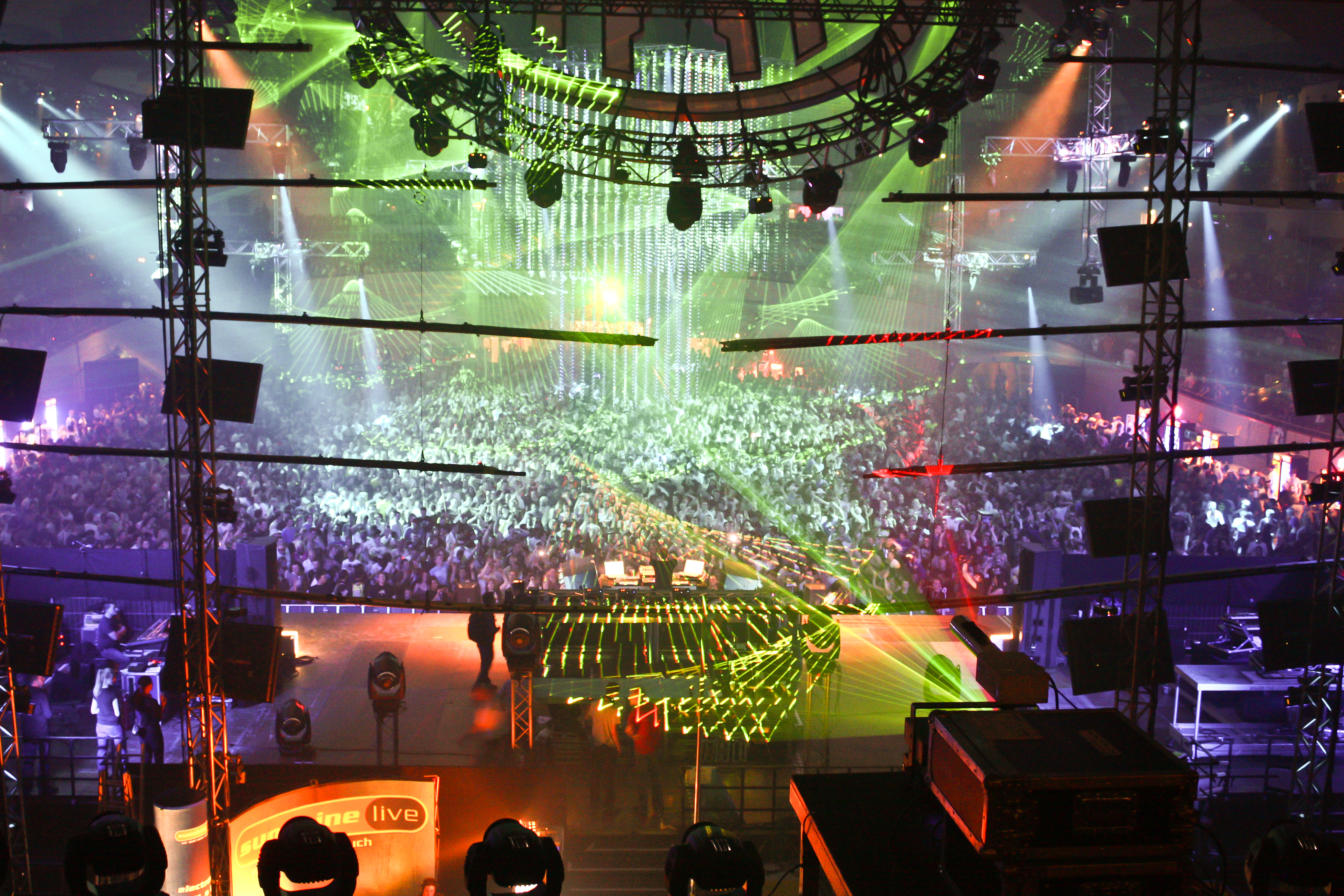 Halle 1 der Mayday 2009 in Dortmund, Blick von hinter der Hauptbühne Richtung Publikum